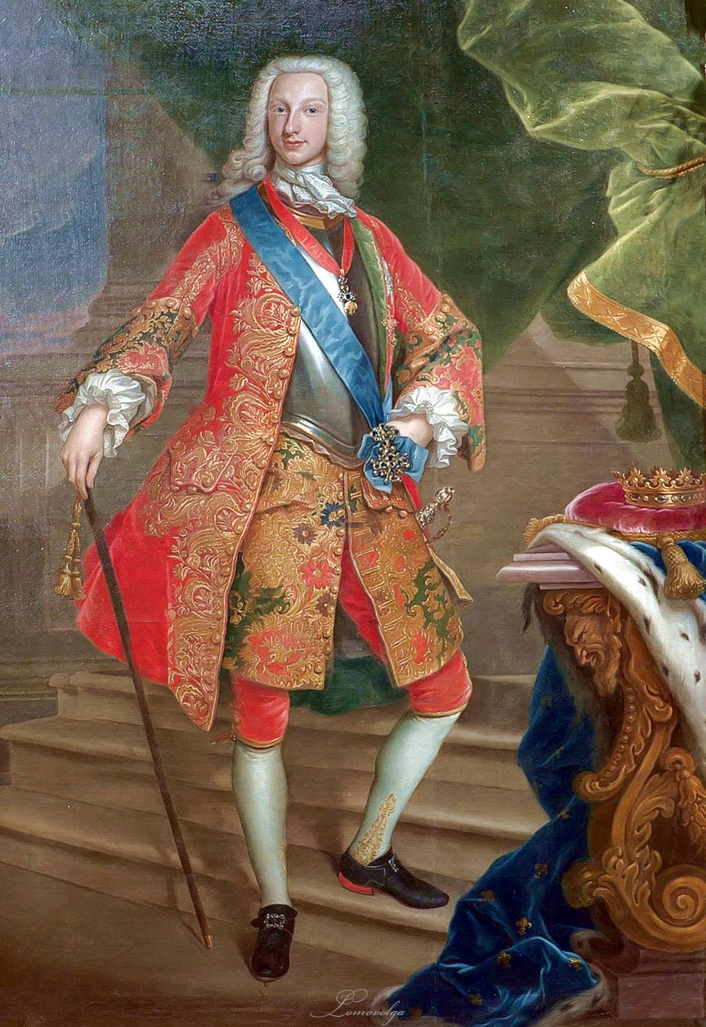 El lienzo representa al infante de España Carlos de Borbón (1719-1788), que era hijo del rey Felipe V de España y en la época del retrato era duque de Parma, aunque posteriormente llegaría a reinar en Nápoles como Carlos VII y en España como Carlos III.